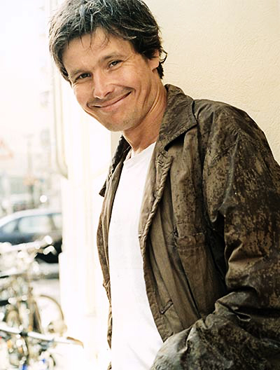 Portrait Tilman Günther